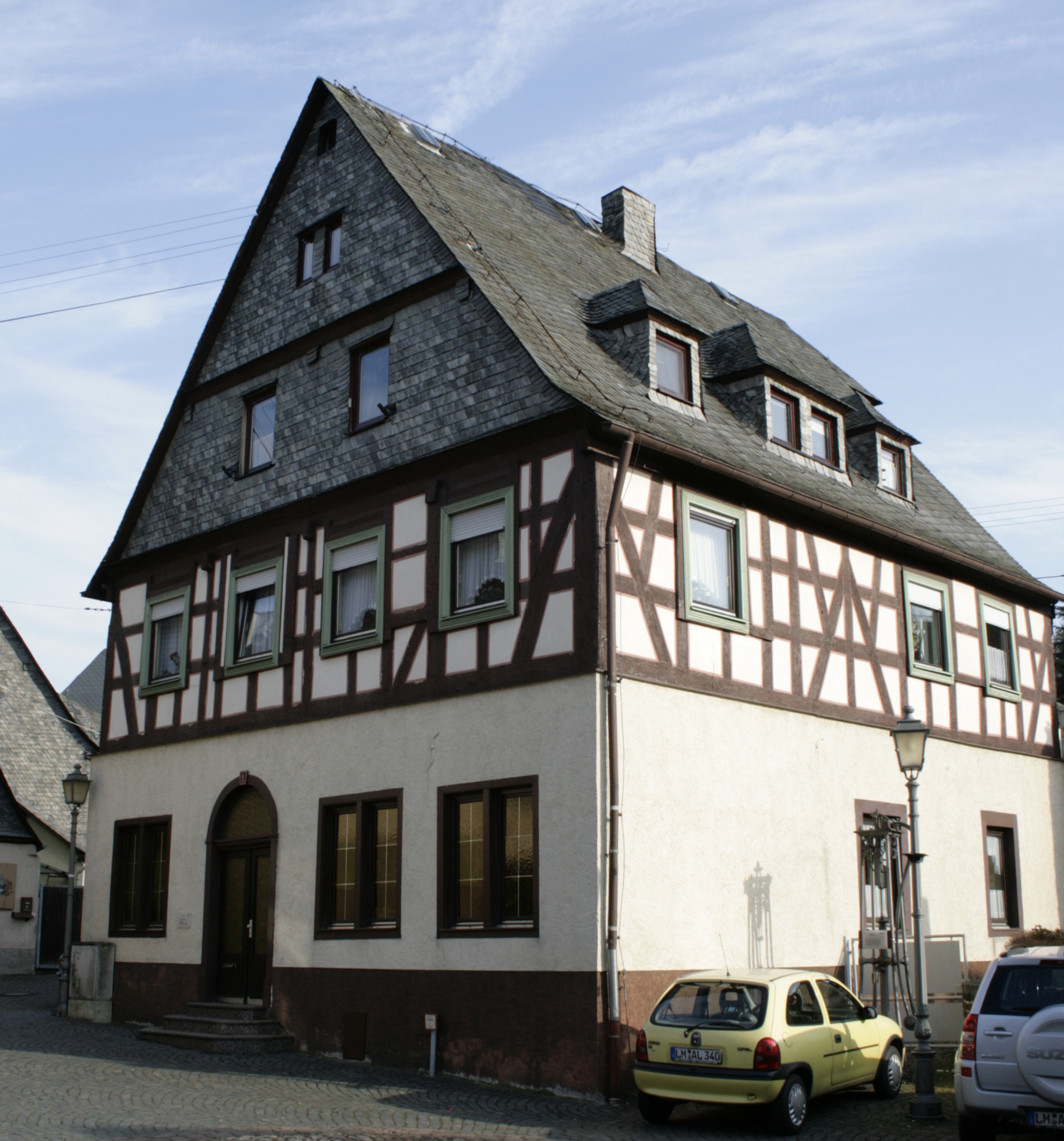 Altes Rathaus in Runkel, Deutschland